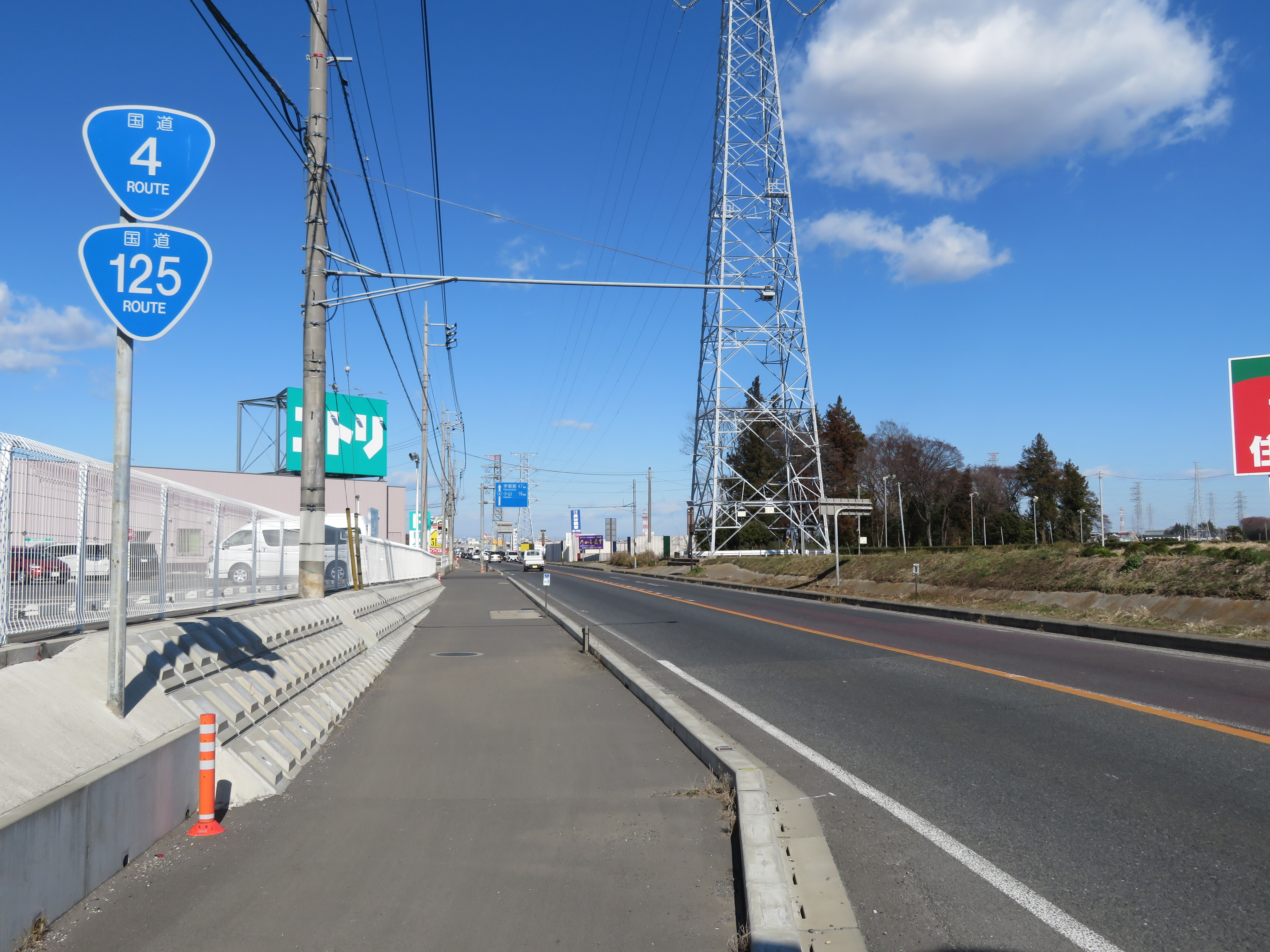 国道4号、国道125号茨城県古河市大堤付近（小山方面側を撮影） Canon PowerShot SX720 HS